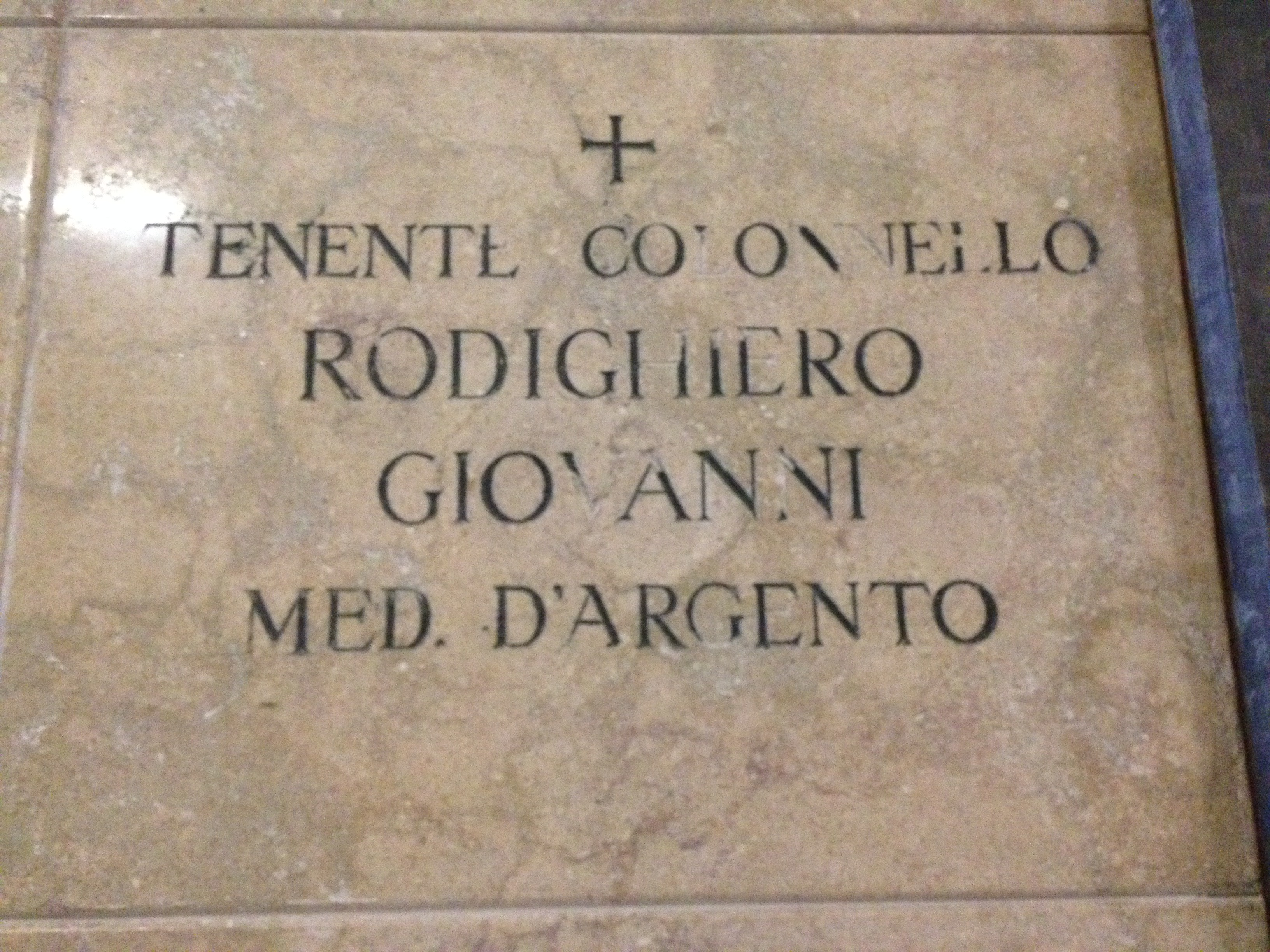 Lapide tombale del Col. Giovanni Rodeghiero (riportato come Rodighiero, come spesso accade per i due noti cognomi dell'Altopiano di Asiago)